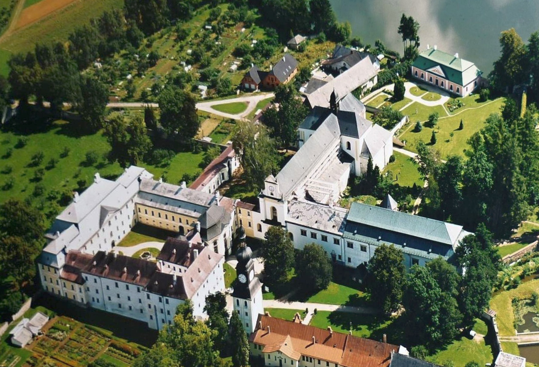 Zámek ve Žďáru nad Sázavou